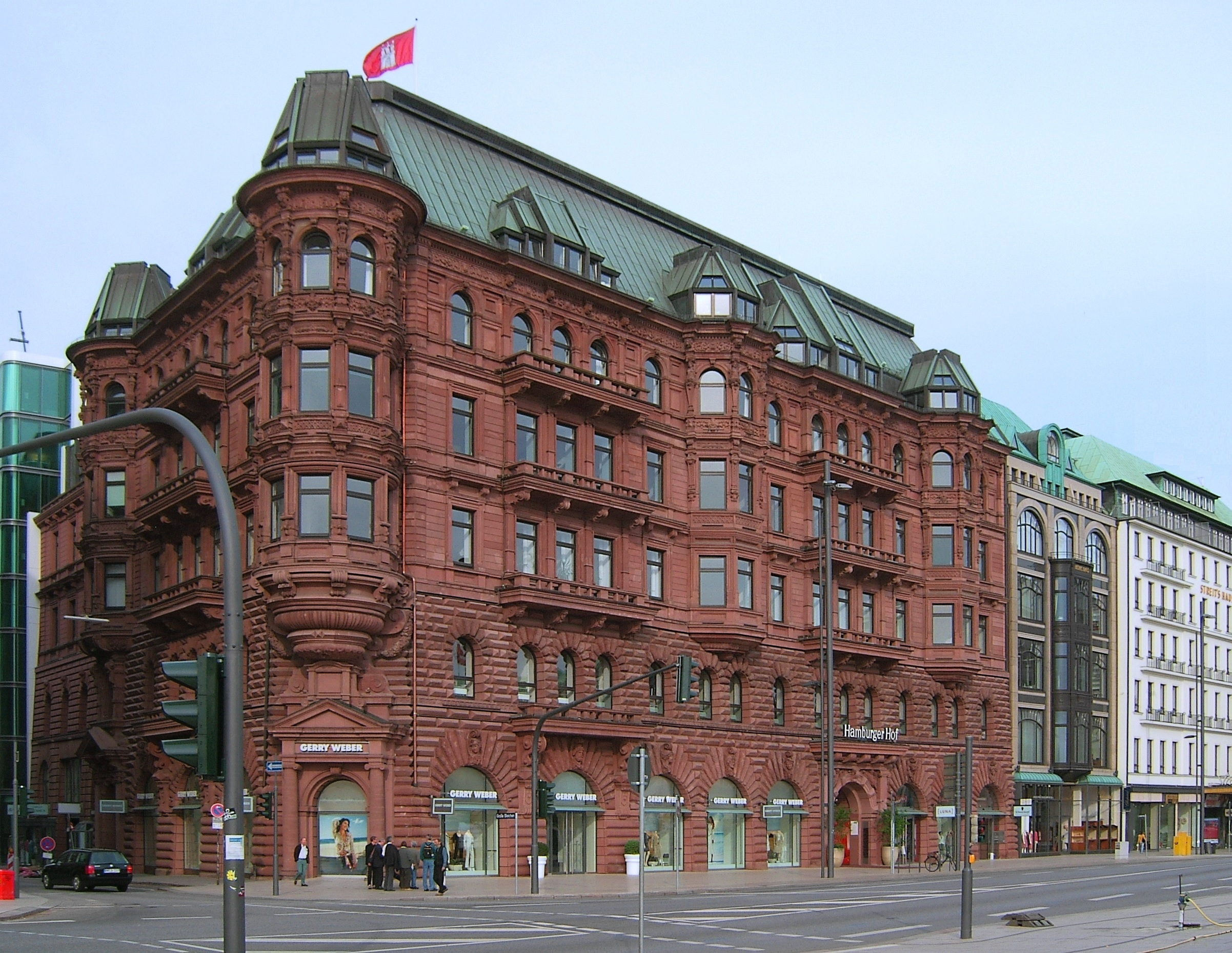 Der Hamburger Hof am Jungfernstieg in der Hamburger Neustadt wurde 1881 bis 1883 nach Plänen von Hanssen & Meerwein als Luxushotel erbaut. Die Fassadenplastiken stammen von Engelbert Peiffer. 1976 bis 1979 wurde das Gebäude von Hans-Joachim Fritz zur Ladenpassage umgebaut.